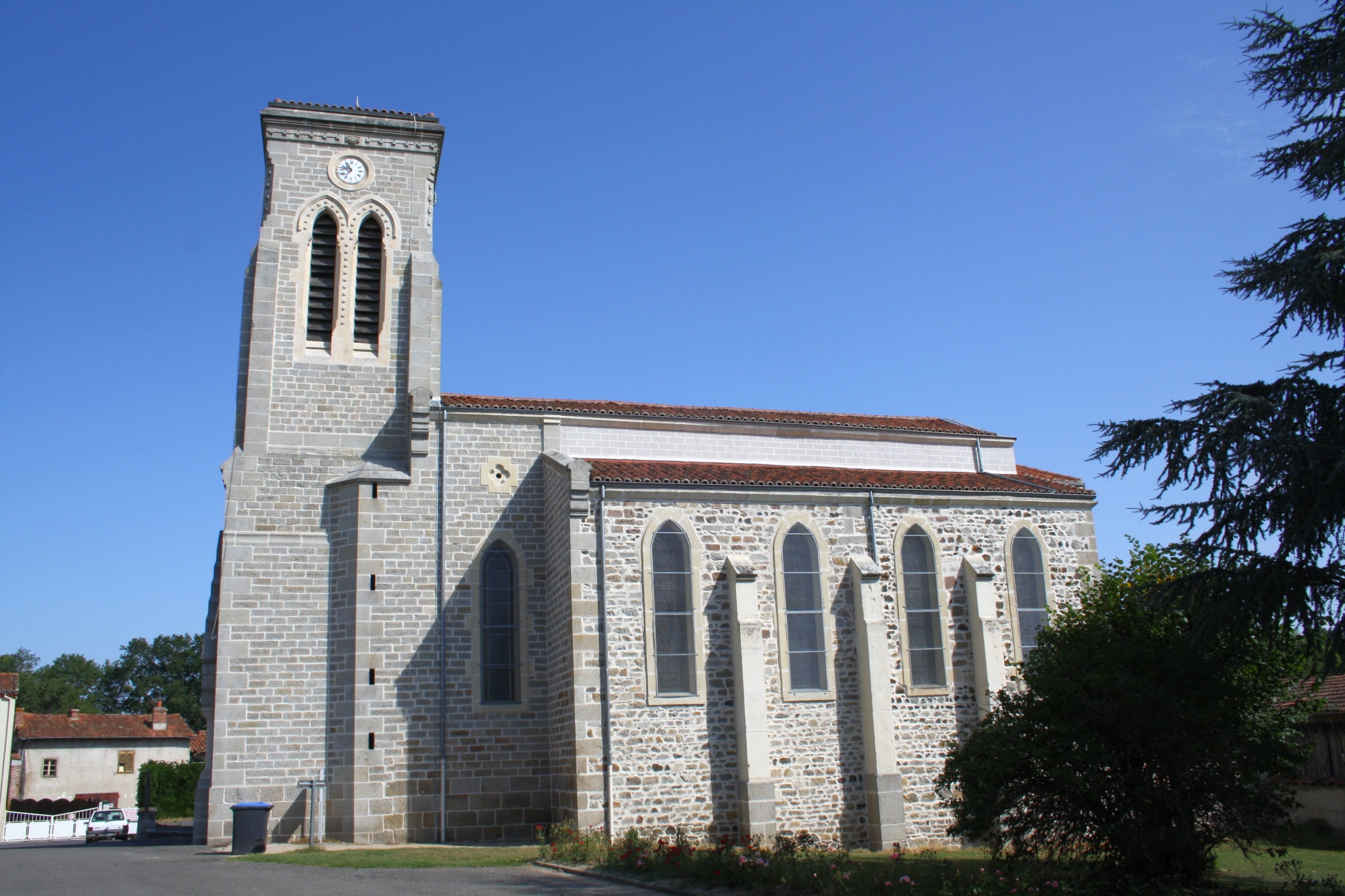 Eglise Saint-Isidore et Saint-Roch à Mornand-en-Forez (Loire)